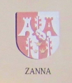 Cognomi storici dei Vicini che discendono dalle famiglie della Regola che abitavano a Predazzo e riguardano 19 cognomi: Boninsegna, Bonora, Bosin, Brigadoi, Defrancesco, Degaudenz, Dellagiacoma, Dellantonio, Dellasega, Demartin, Dezulian, Felicetti, Gabrielli, Giacomelli, Guadagnini, Morandini, Nicolao, Piazzi e Zanna.